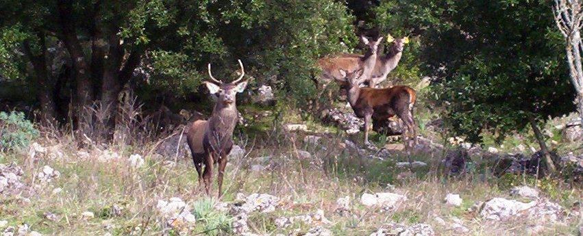 Branco di cervi, Foto scattata nel Taccu di Ulassai